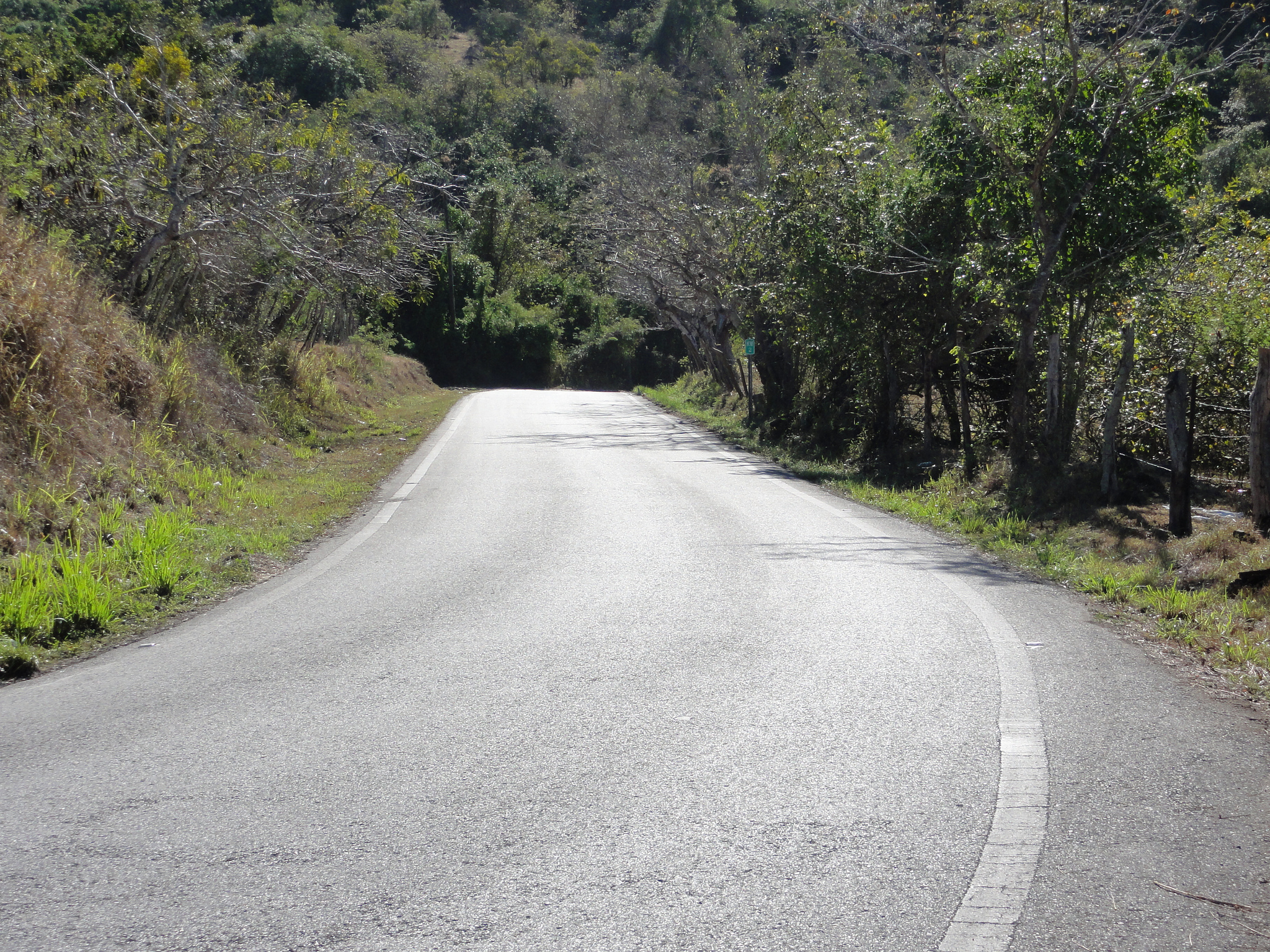 Escena en el Barrio Quedrada Limon (PR-502, Km 2.0), Ponce, Puerto Rico